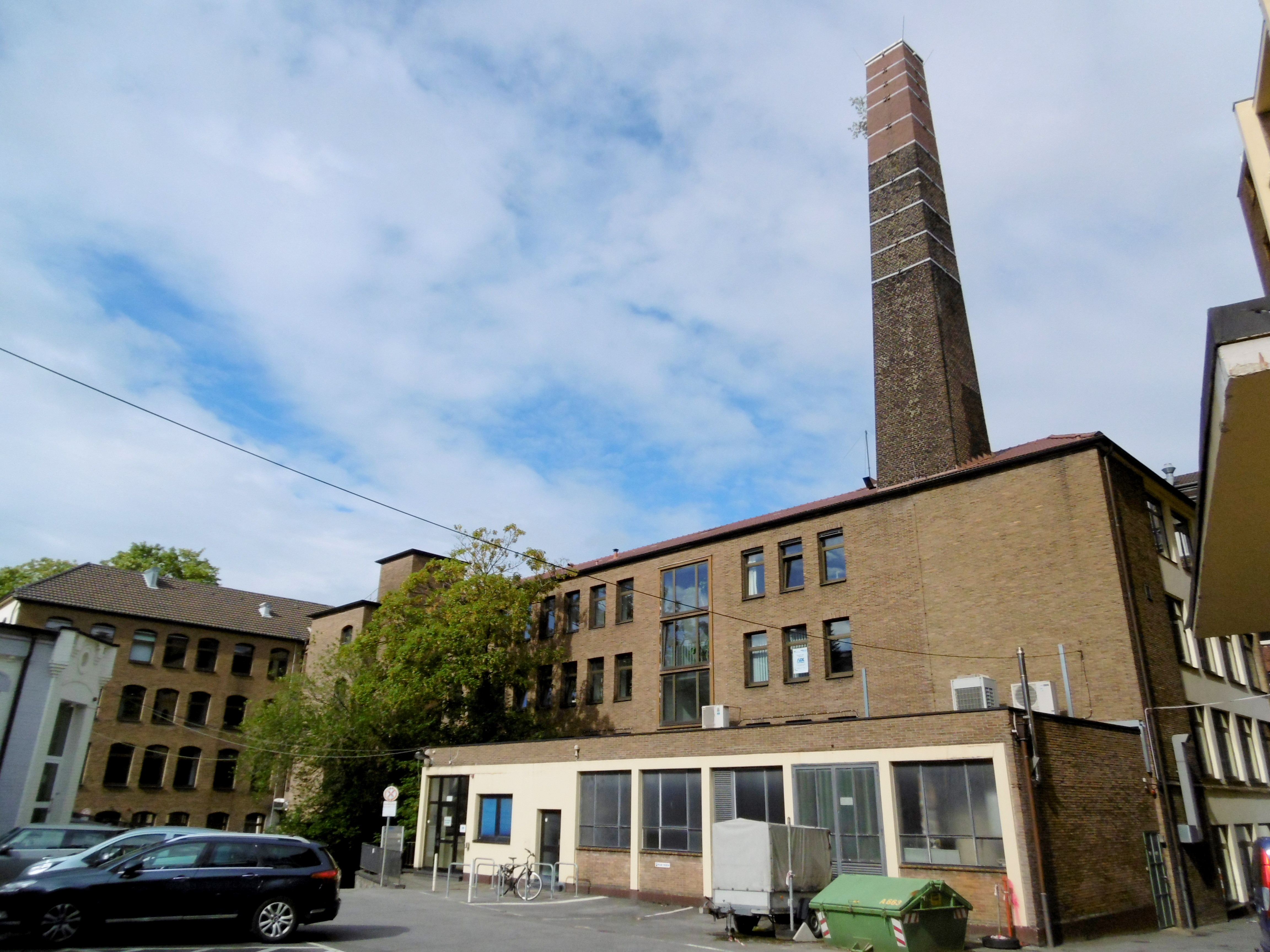 ehemalige Tuchfabrik Lochner in Aachen, Rückseitige Ansicht, heute RWTH-Gebäude